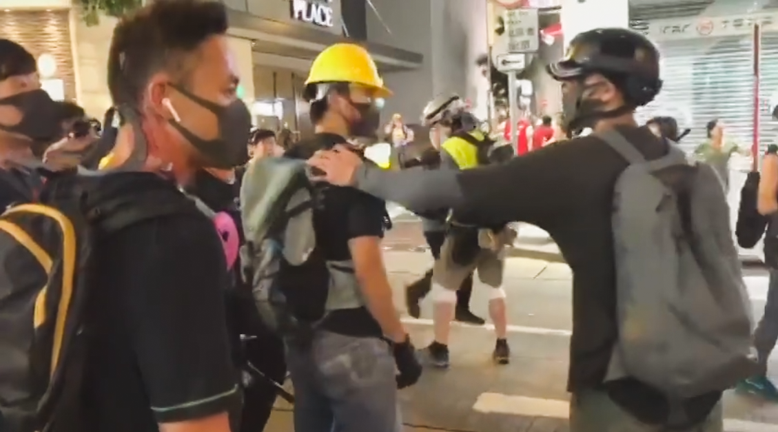 香港警務人員打扮成示威者混入示威群眾